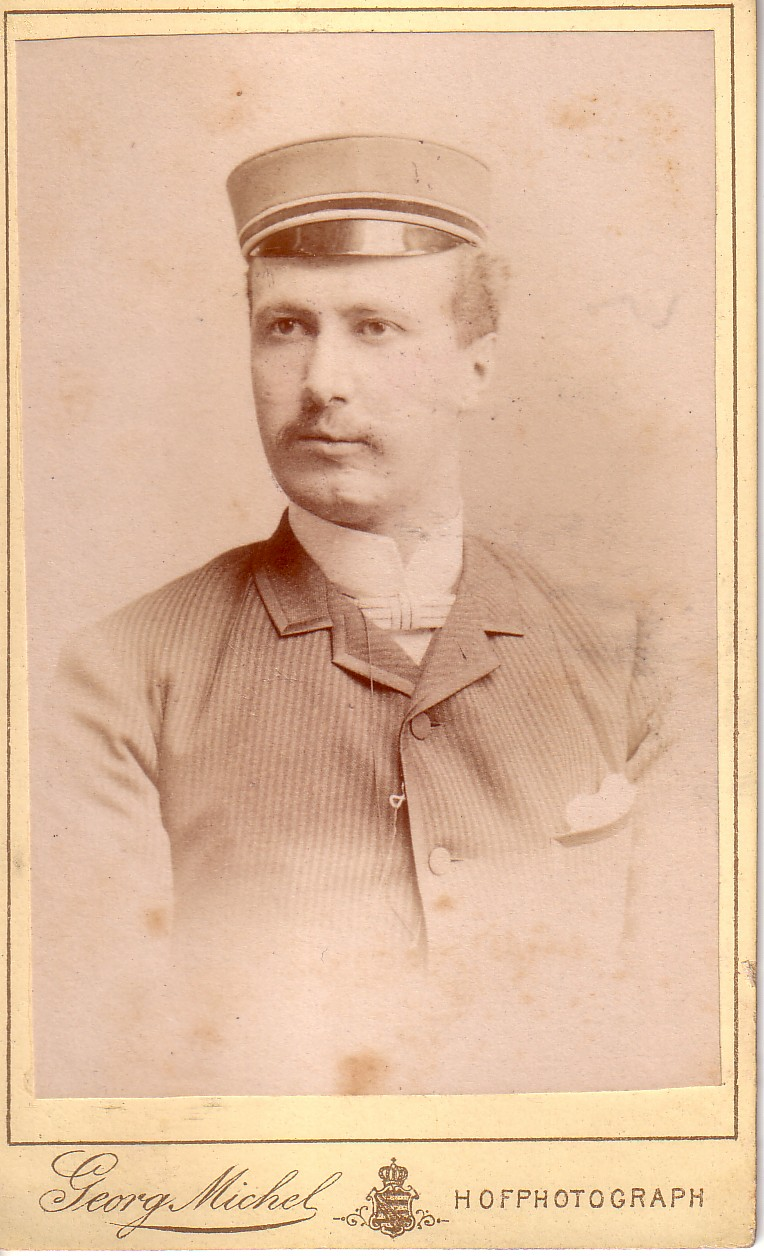 Rudolf von Bennigsen als Straßburger Schwabe